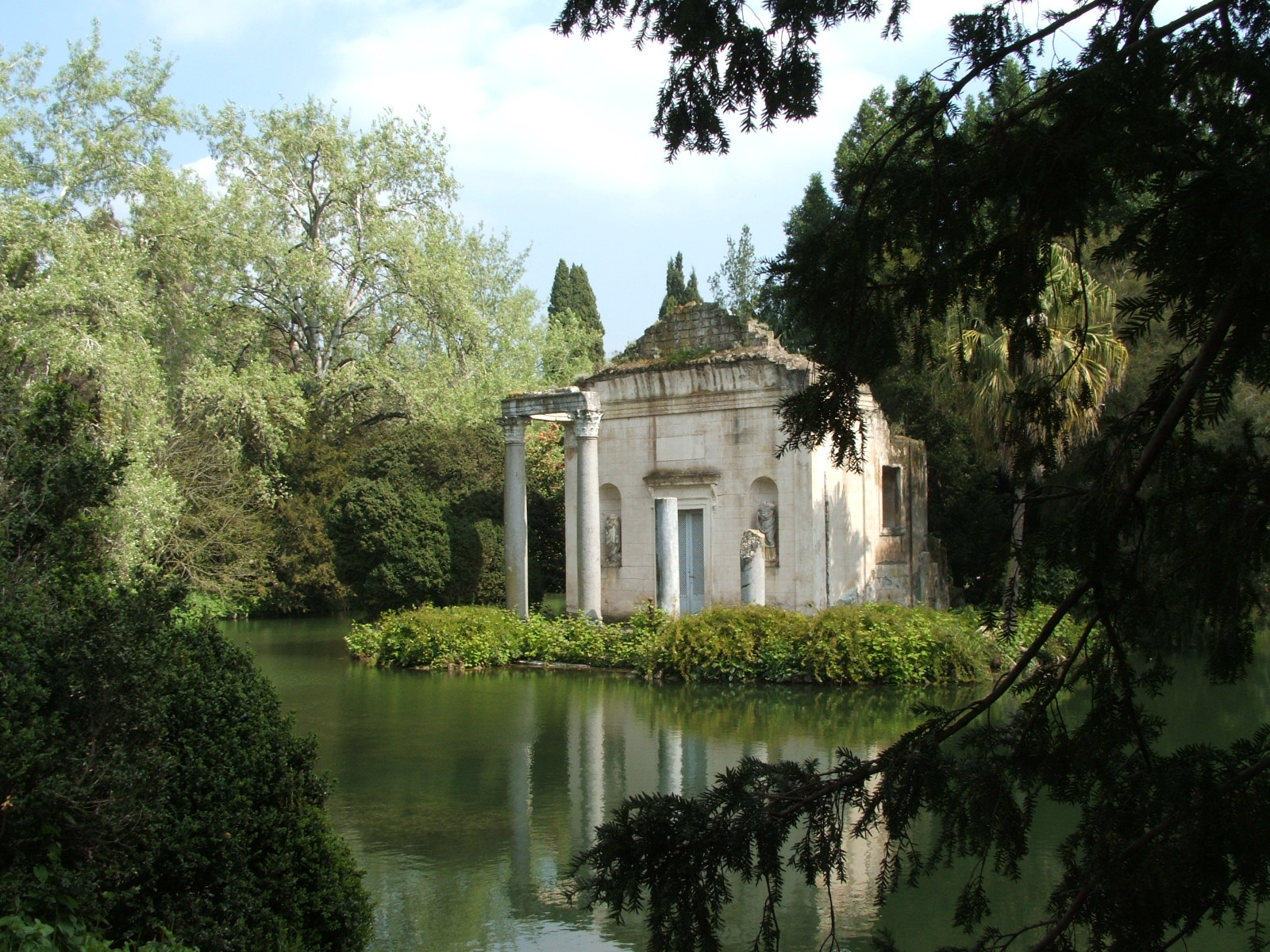 Immagine dalla Reggia di Caserta, Caserta, Campania, Italia. Il giardino inglese di Maria Carolina